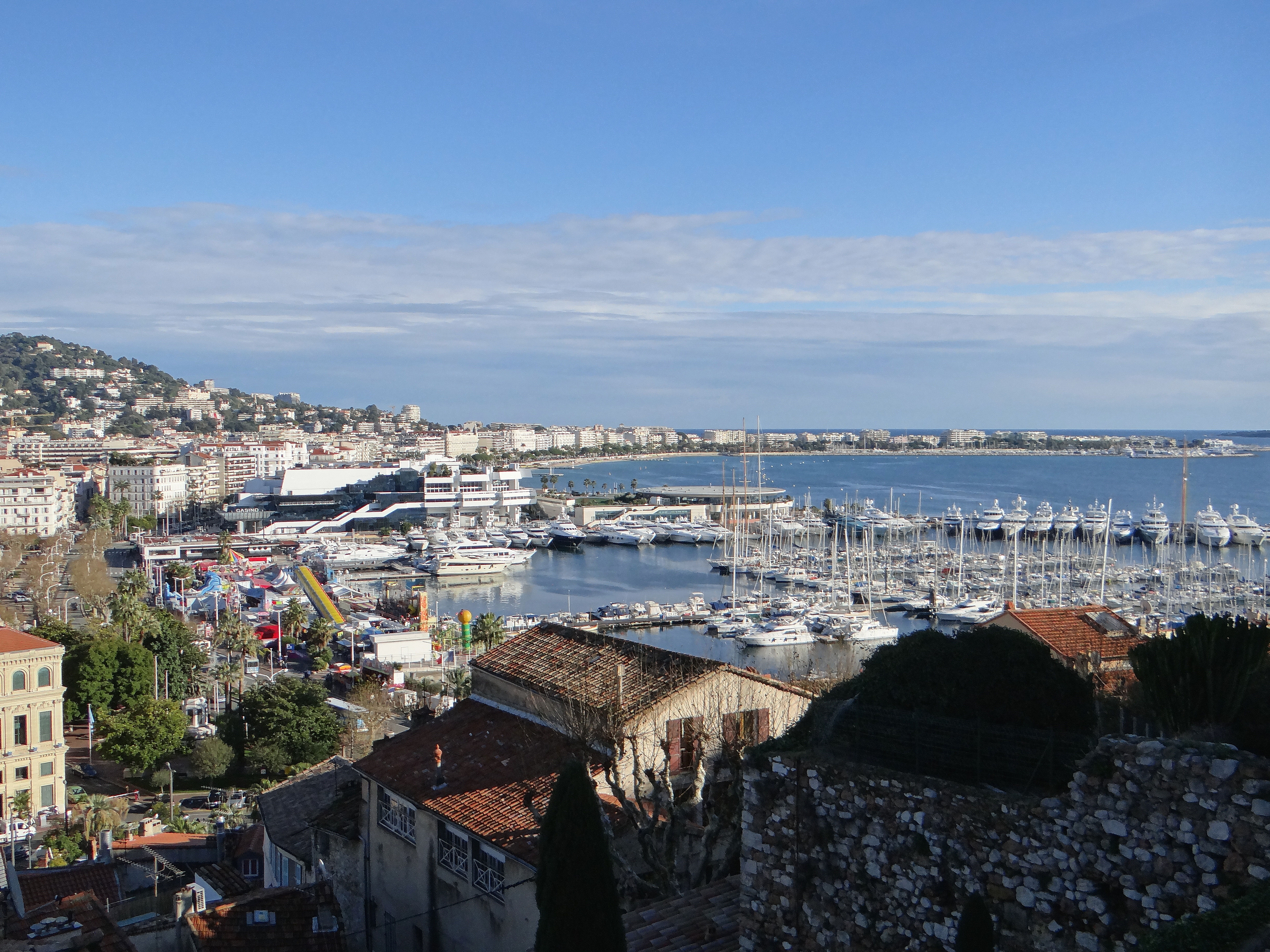 Cannes vu du Suquet